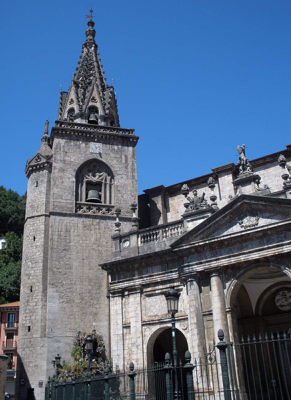 Iglesia de San Sebastián de Soreasu (Azpeitia, Gipuzkoa)